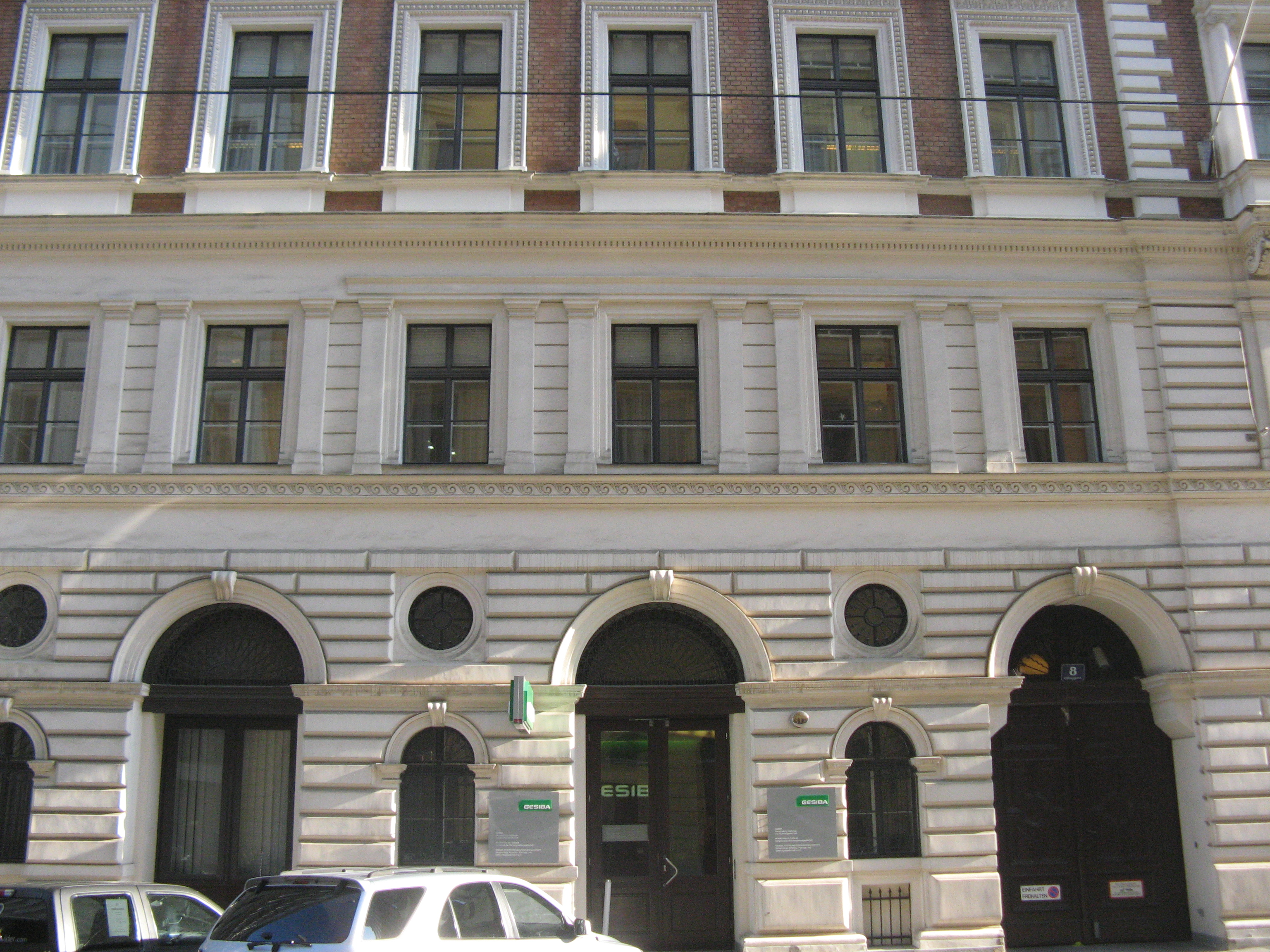 Haus Esslinggasse 8-10, Wien-Innere Stadt